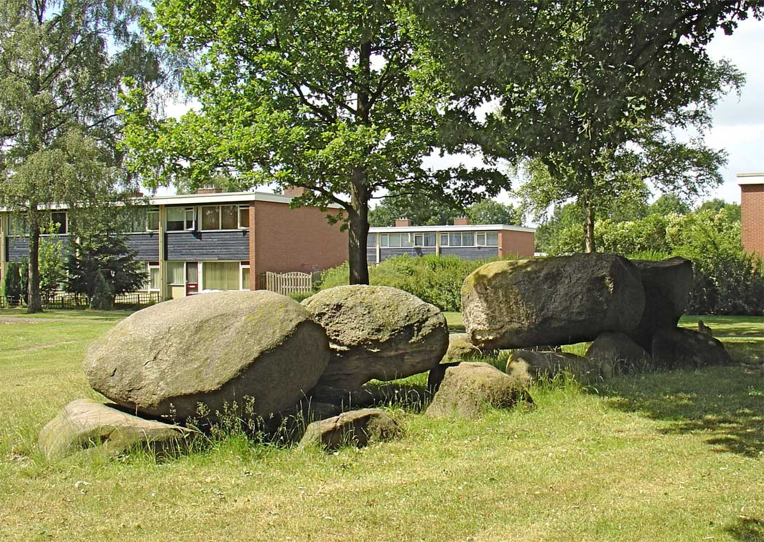 Hunebed D46 in de wijk Angelslo van Emmen